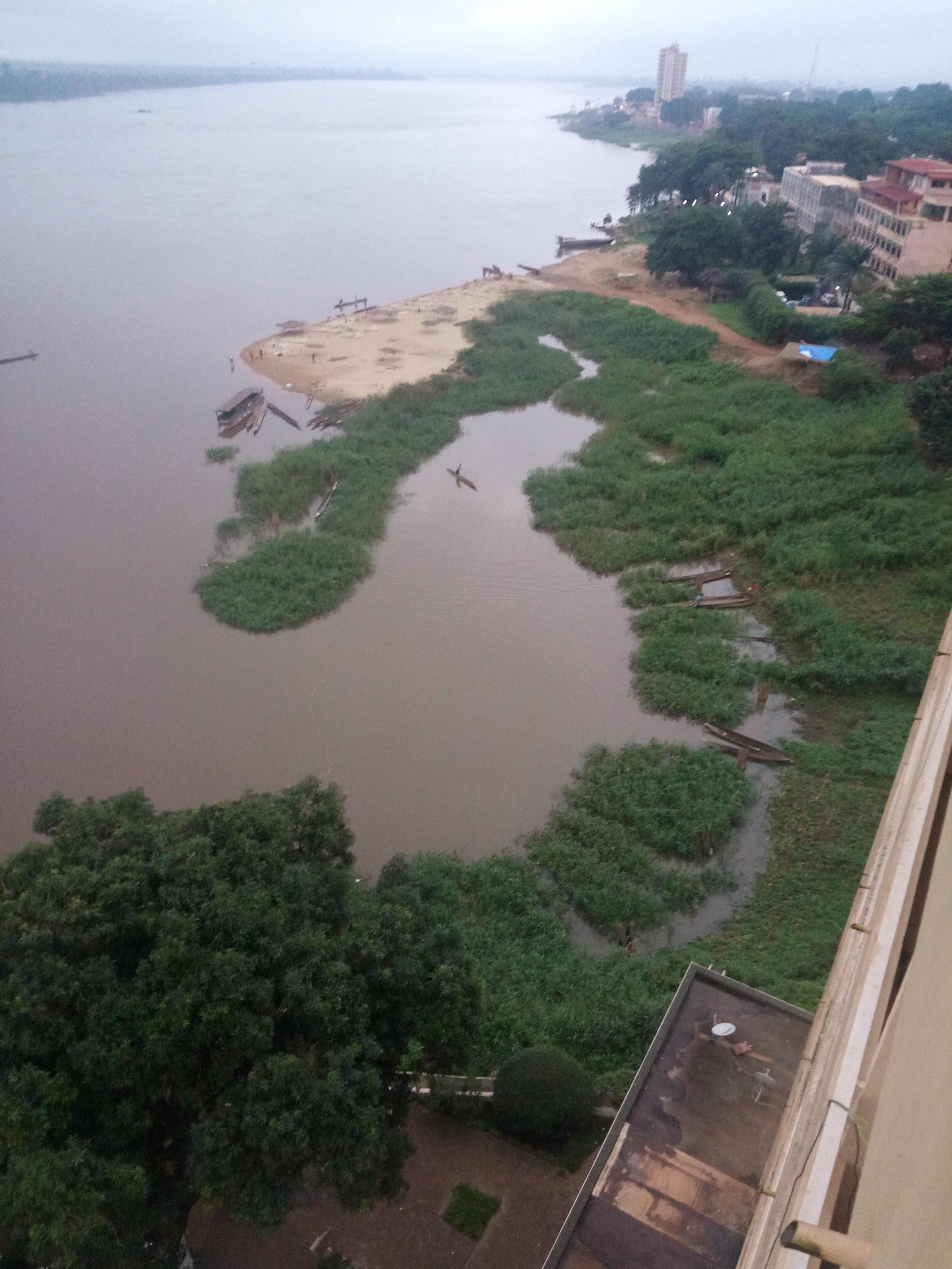 Vue sur la rivière Oubangui depuis le neuvième étage de l'hôtel Oubangui à Bangui en Centrafrique.